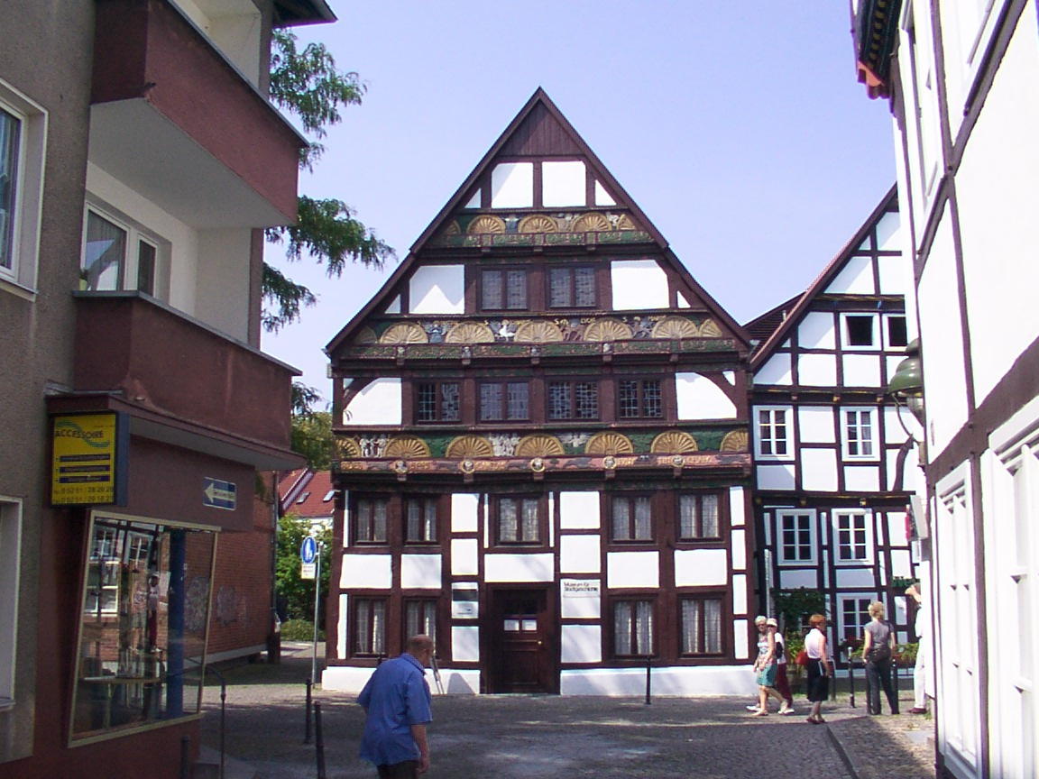 Paderborn, Germany: Adam-und-Eva-Haus, Sitz des Museums für Stadtgeschichte